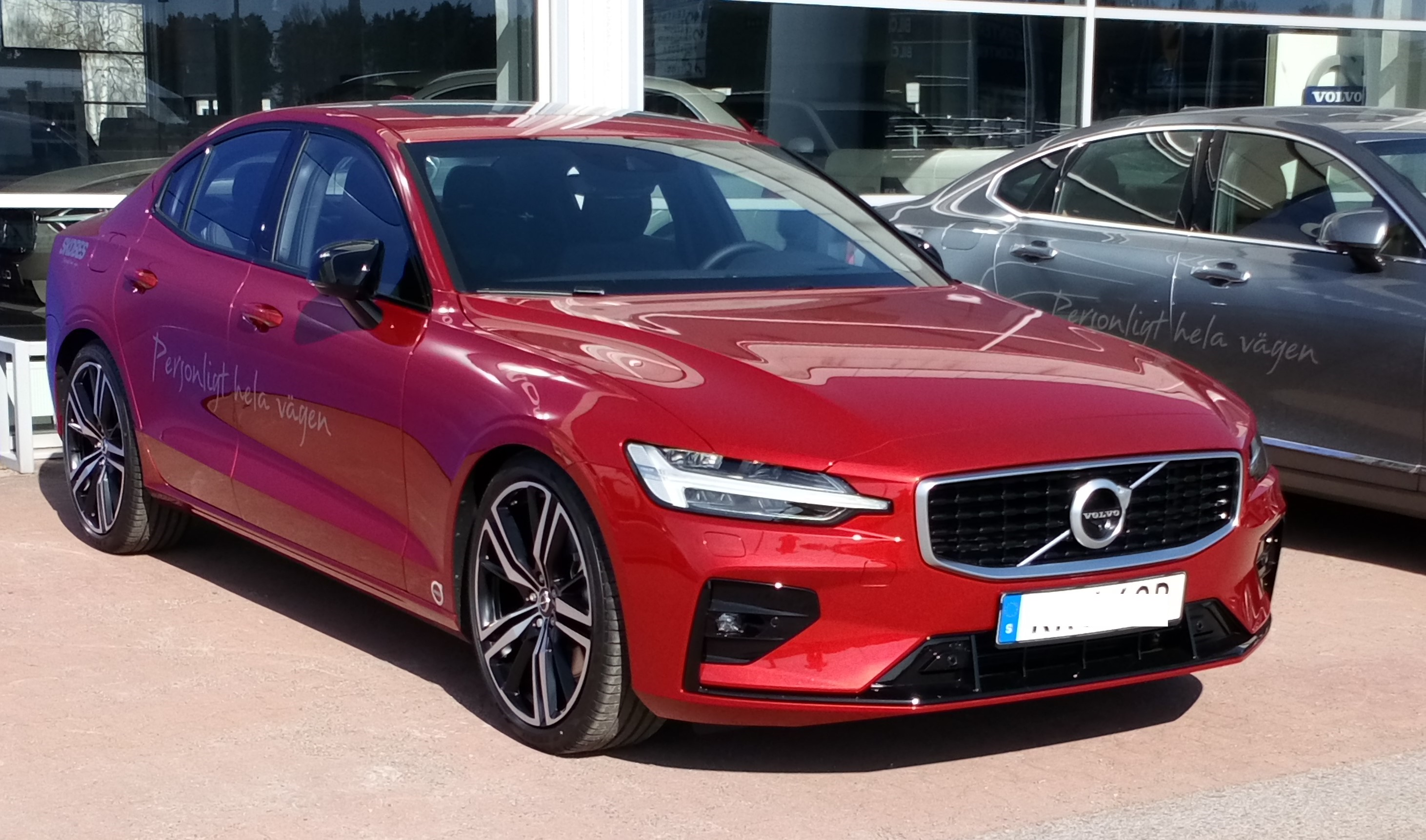 2019 Volvo S60 T5 R-Design